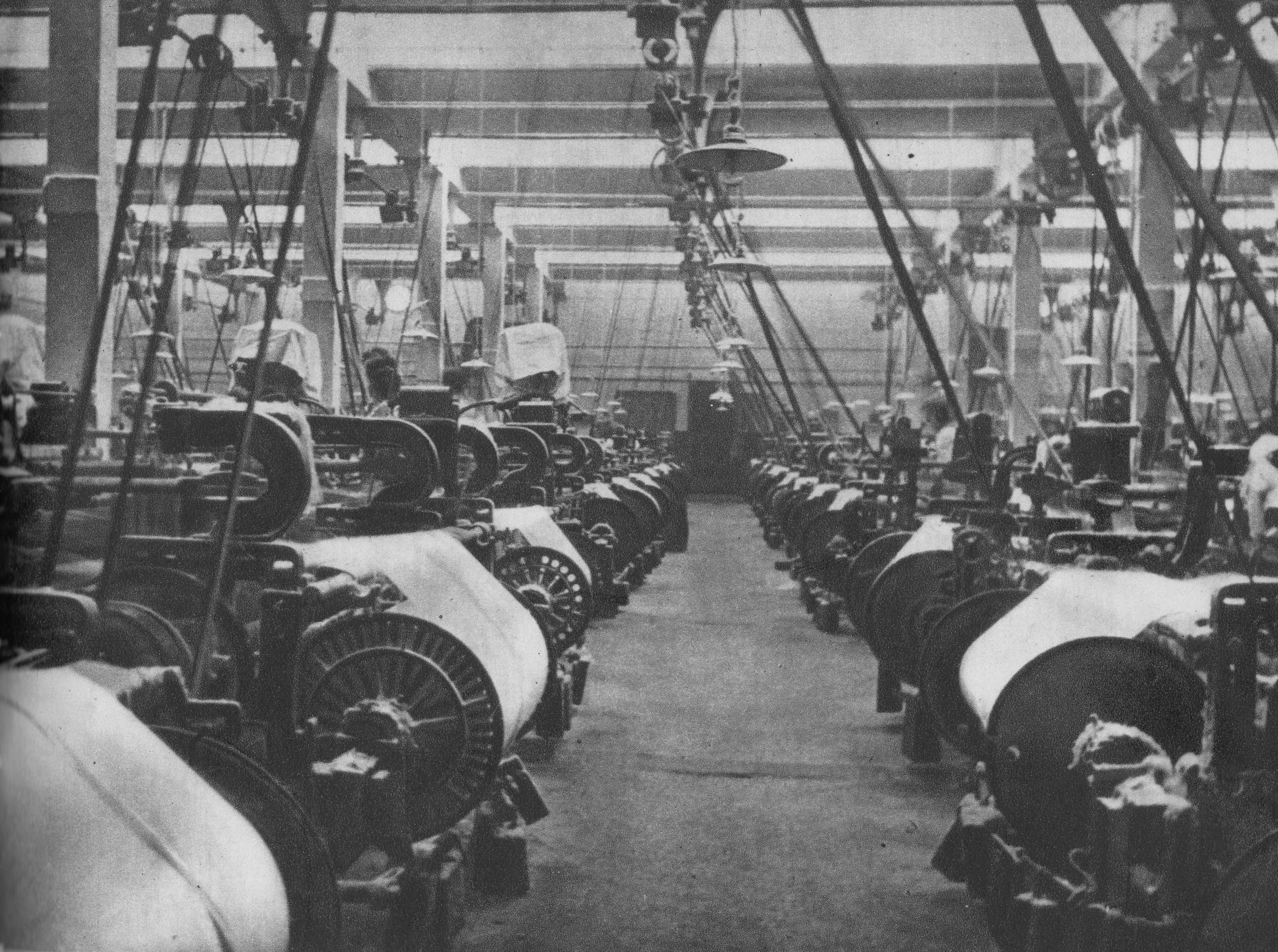 Wnętrze hali maszyn w fabryce w Łodzi